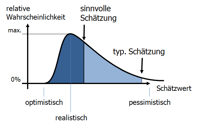 Darstellung einer typischen Wahrscheinlichkeitsfunktion bei Schätzungen zur veranschaulichung der expliziten 3-Punkt-Schätzung